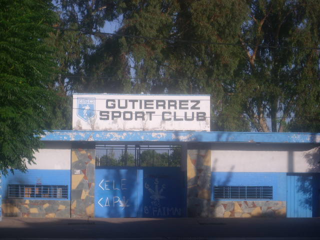 Gutiérrez Sport Club.